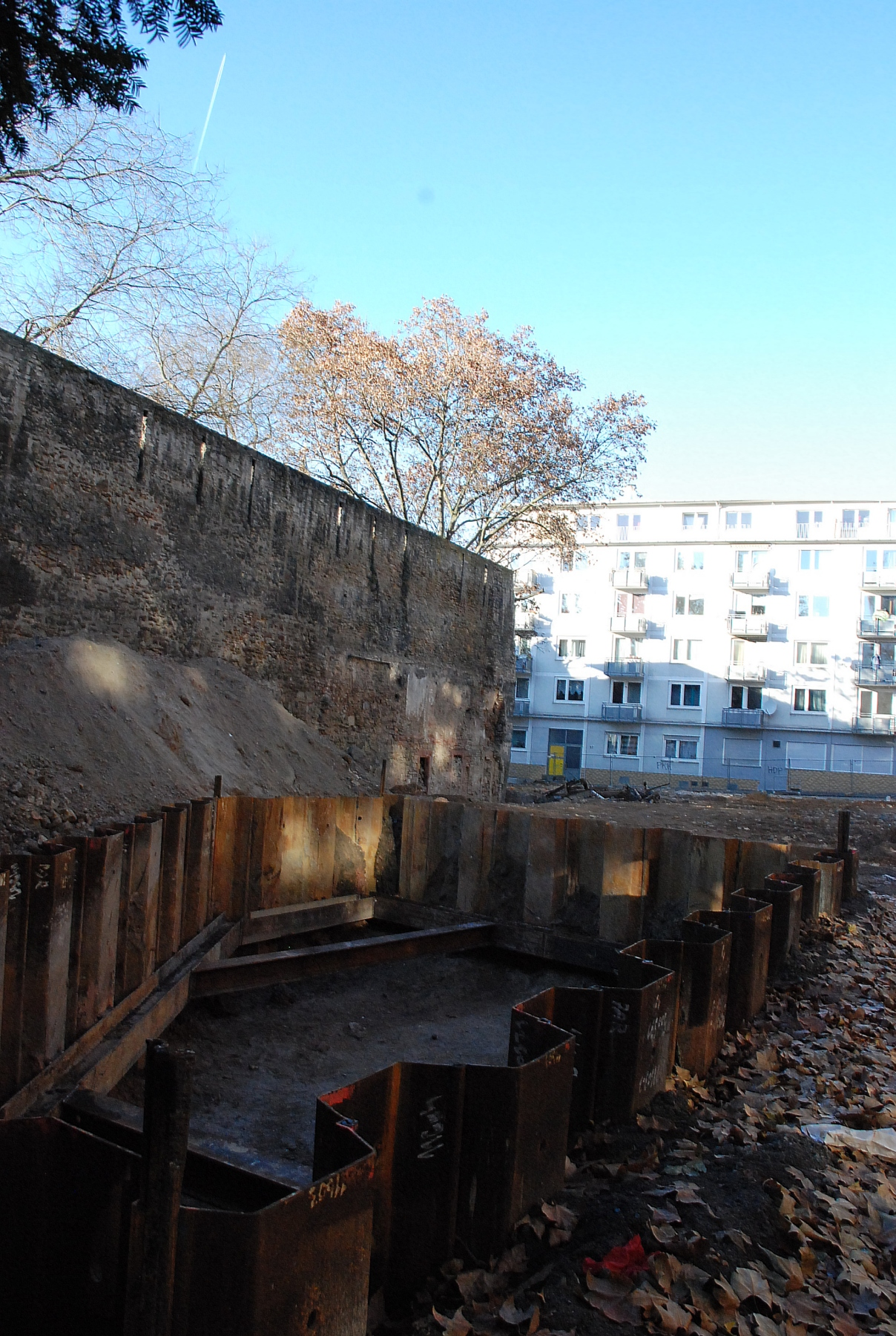 Die Mainzer Stadtmauer von der Fachhochschule in Blickrichtung Weintorstraße.